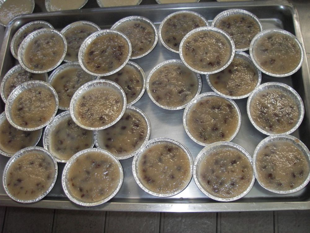 中文（台灣）: 好吃的鹹甜粿